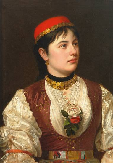 Polekonia Tolorovitschka, 1889, oil on canvas, 58 x 42,5 cm